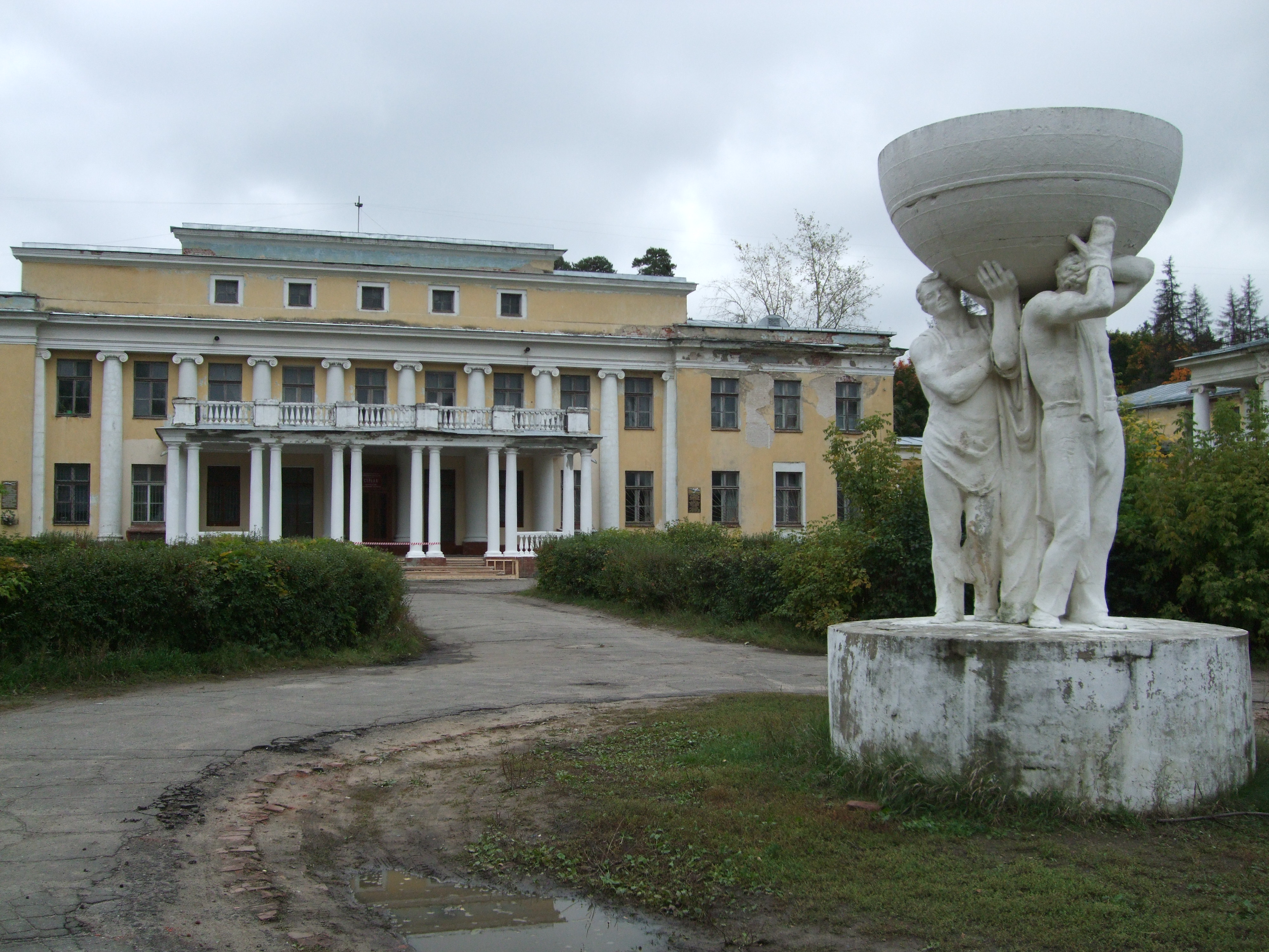 Россия, город Жуковский. Муниципальный театр "Стрела"